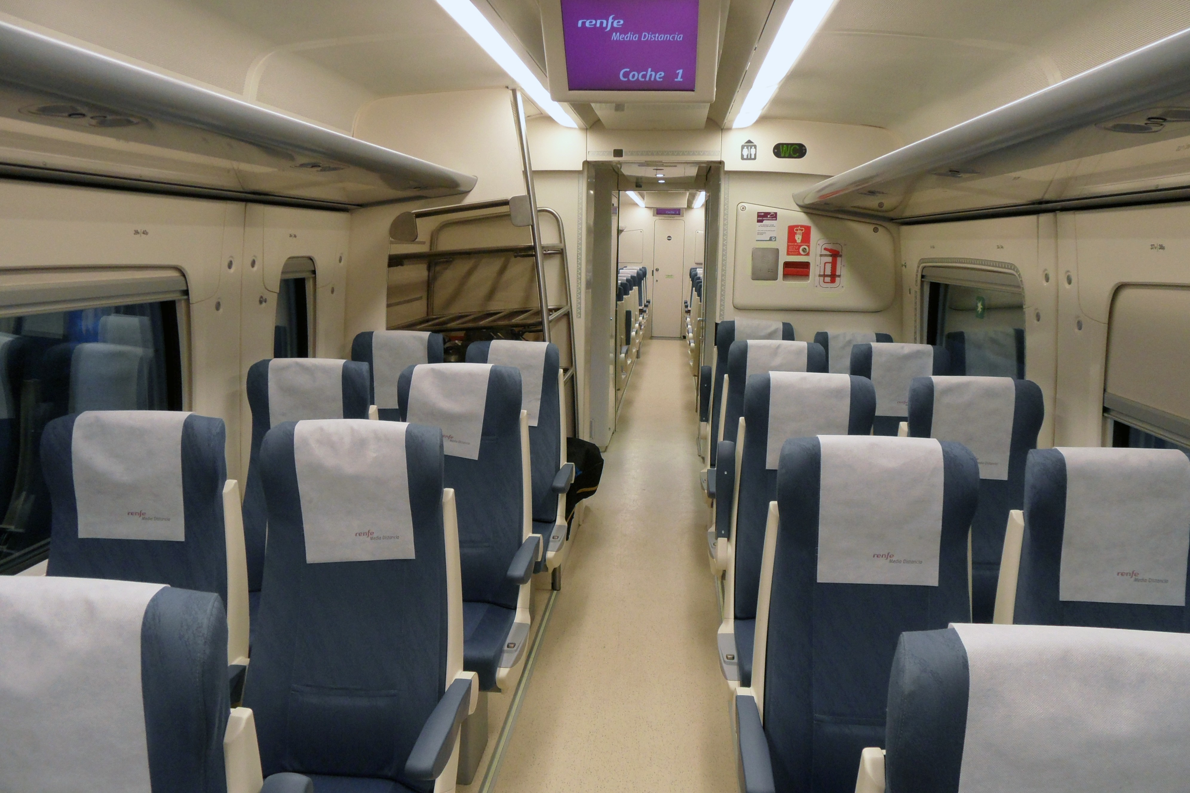 Endwagen der Renfe-Baureihe 449, in Wagenmitte befindet sich der Einstiegsraum